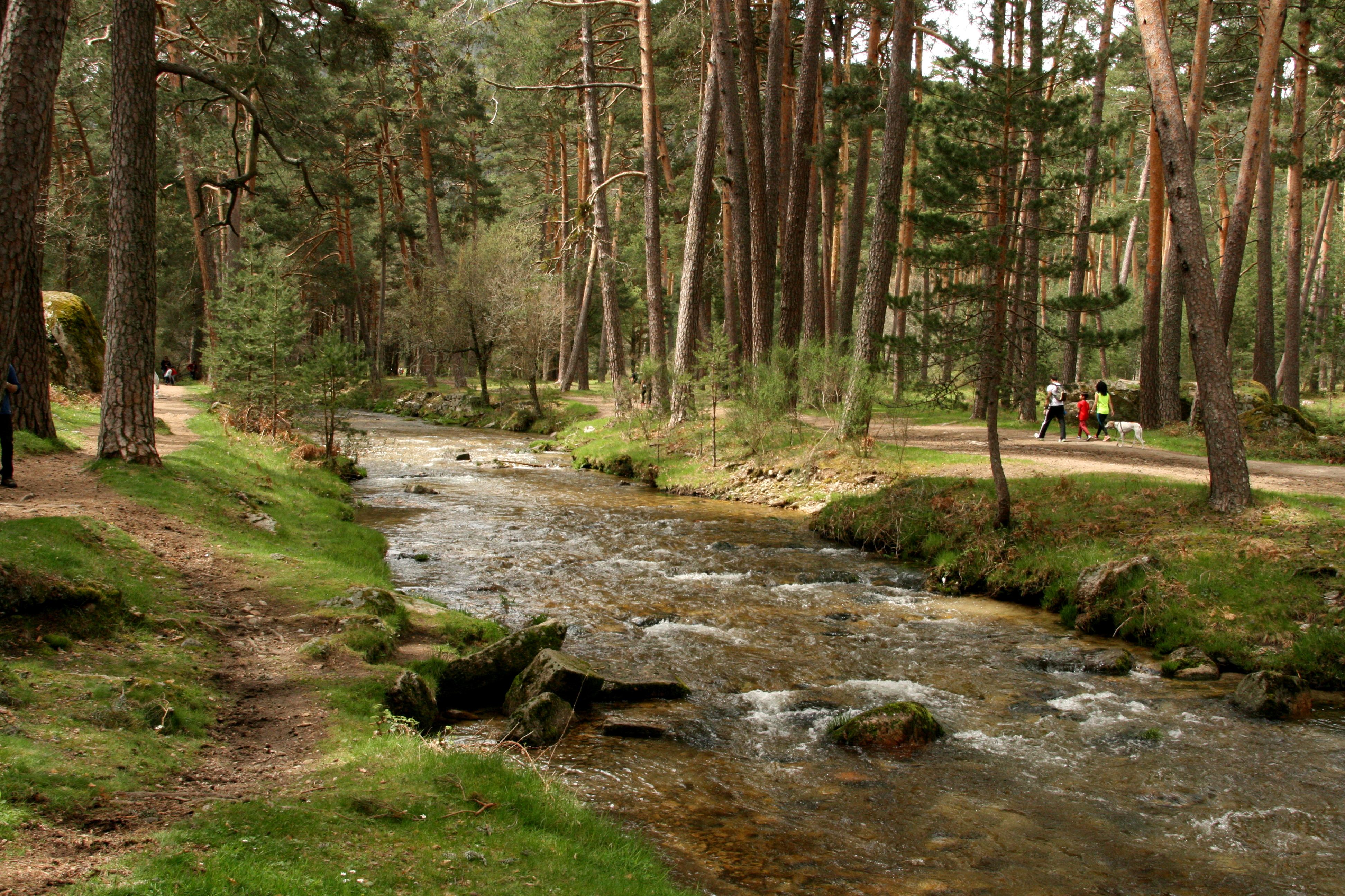 Río Eresma en la zona de los montes de Valsaín, en las inmediaciones del área recreativa de Los Asientos. Forma parte del lugar de interés comunitario de la Sierra de Guadarrama y del parque natural Sierra Norte de Guadarrama. This is a photography of a Special Area of Conservation in Spain with the ID: ES4160109. Natura2000 entry, EEA entry